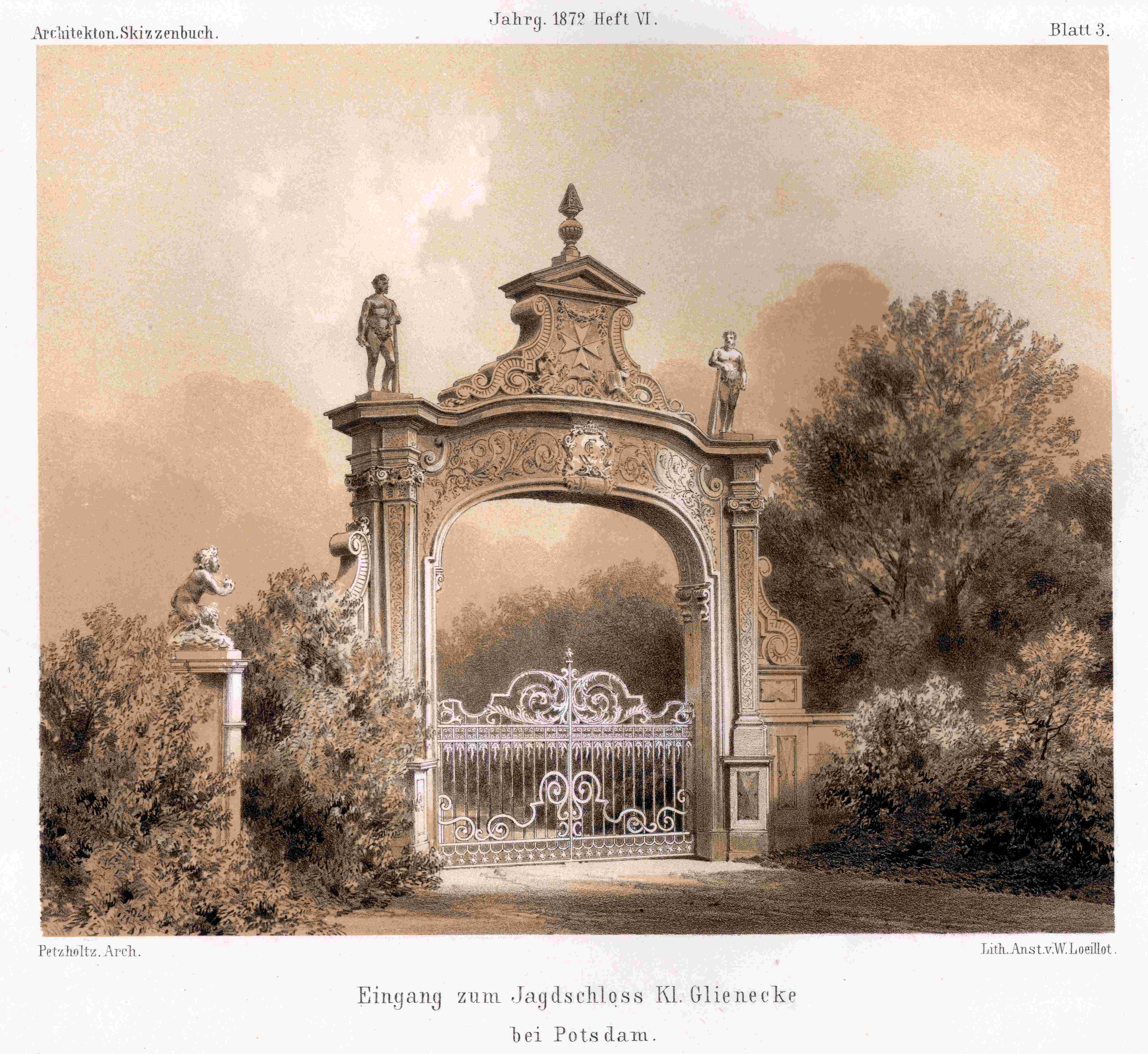 Berlin, Jagdschloss Glienicke, Eingang Transkription: Architekton.Skizzenbuch. Jahrg. 1872 Heft VI. Blatt 3. Petzholtz.Arch. Lith.Anst.v.W.Loeillot. Eingang zum Jagdschloss Kl. Glienecke bei Potsdam.